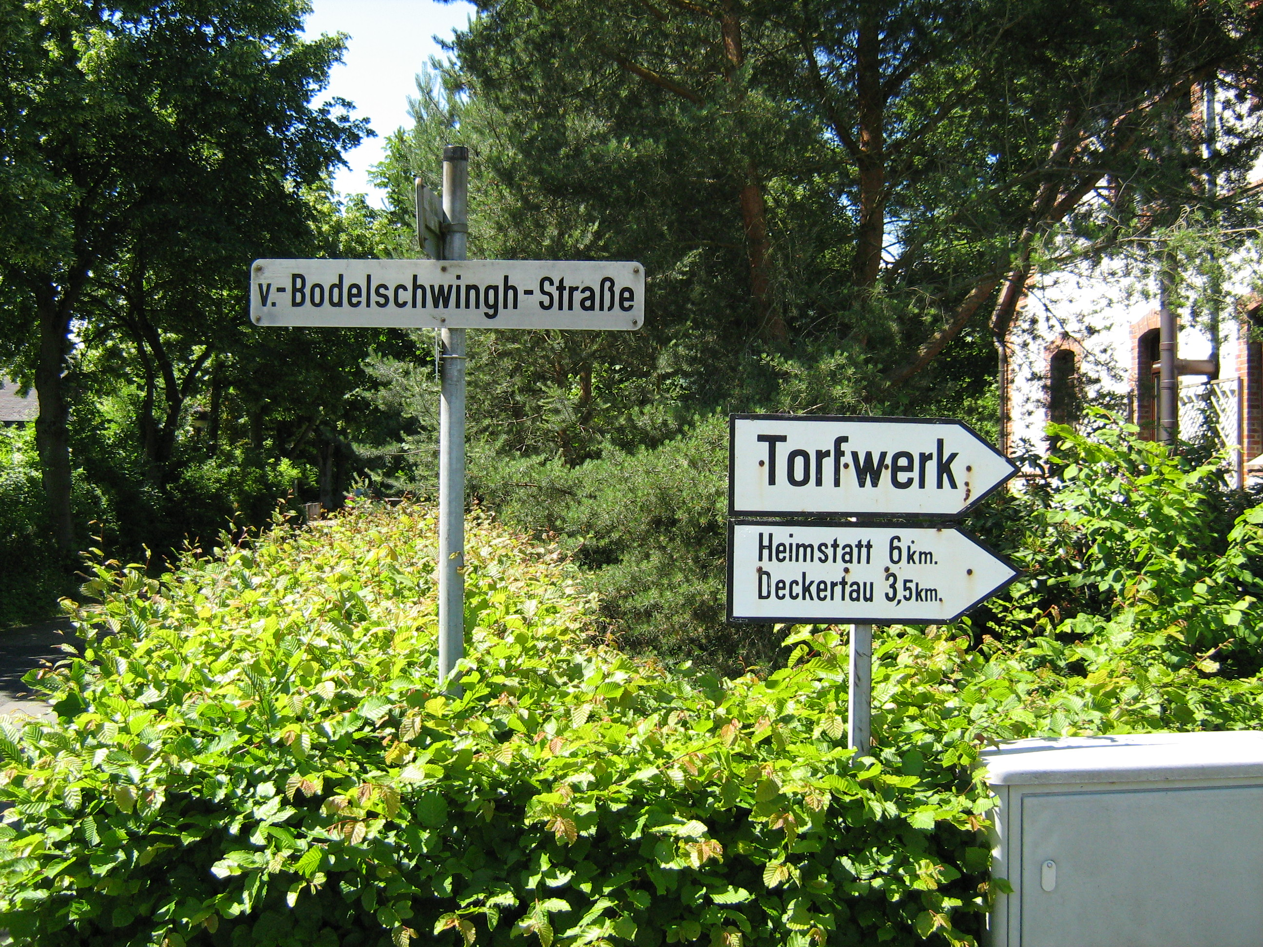 Hinweisschilder im Ort Freistatt